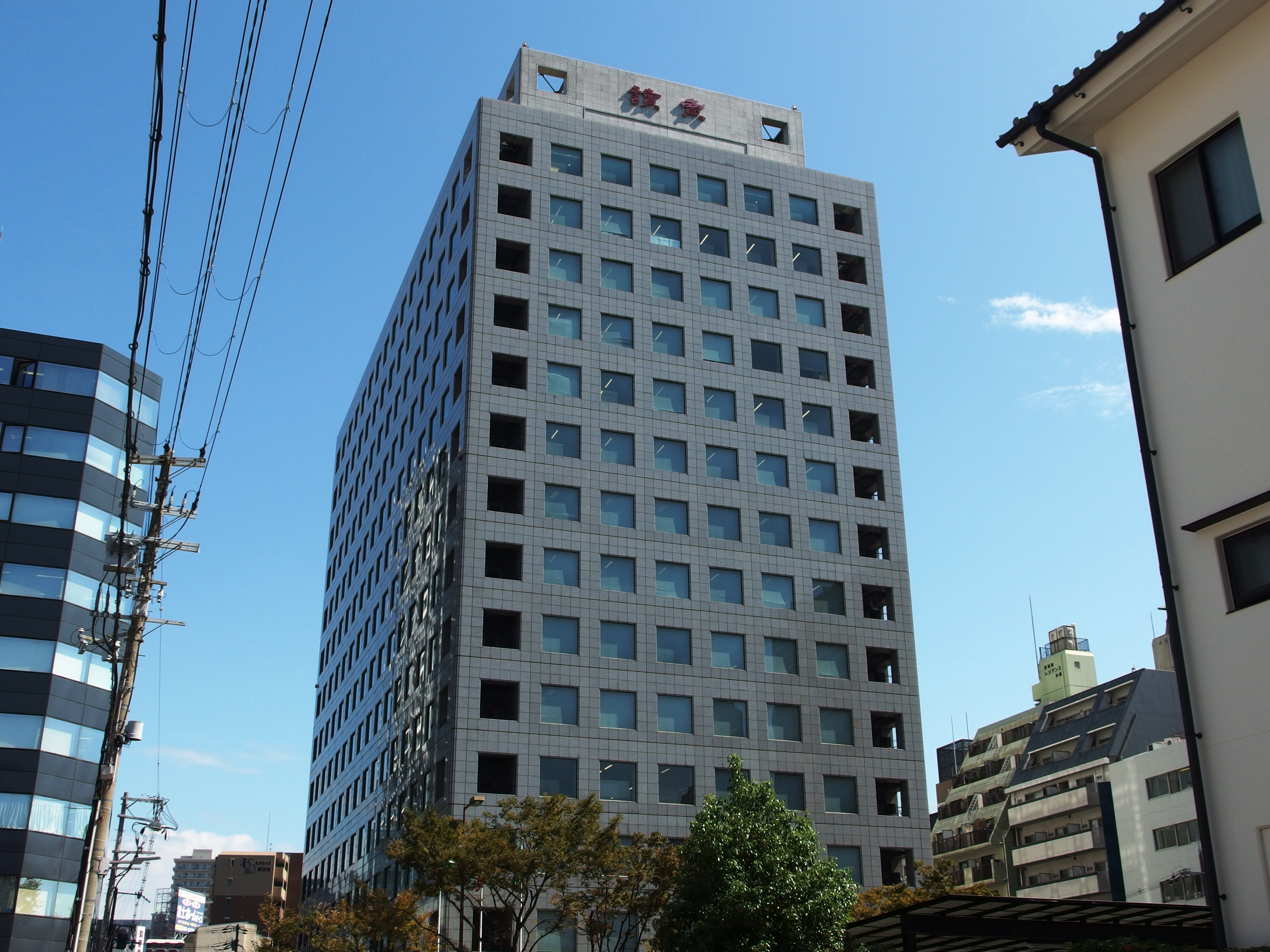 大阪市にある読売新聞大阪本社が入居する読売大阪ビル。